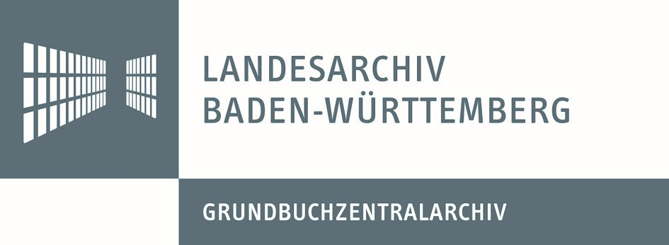 Logo der Außenstelle des Landesarchivs BW, Grundbuchzentralarchiv Kornwestheim